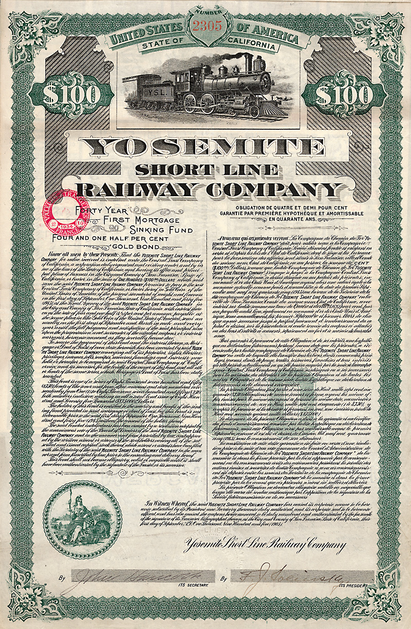 Bond of the Yosemite Short Line Railway Company from the 1st September 1905